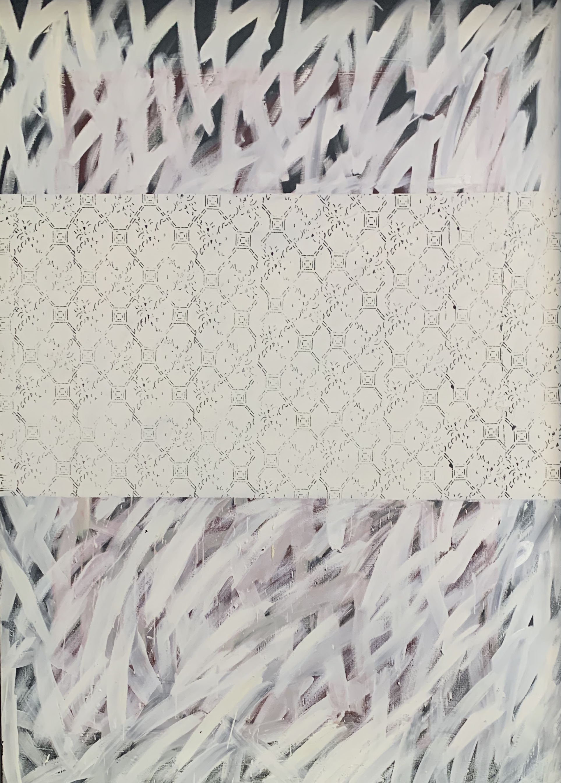 1991, olej na płótnie, 180 x 131 cm